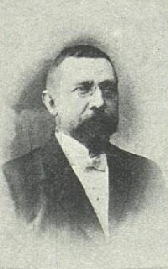 Cyril Papoušek (1863-1936), rakouský a český politik